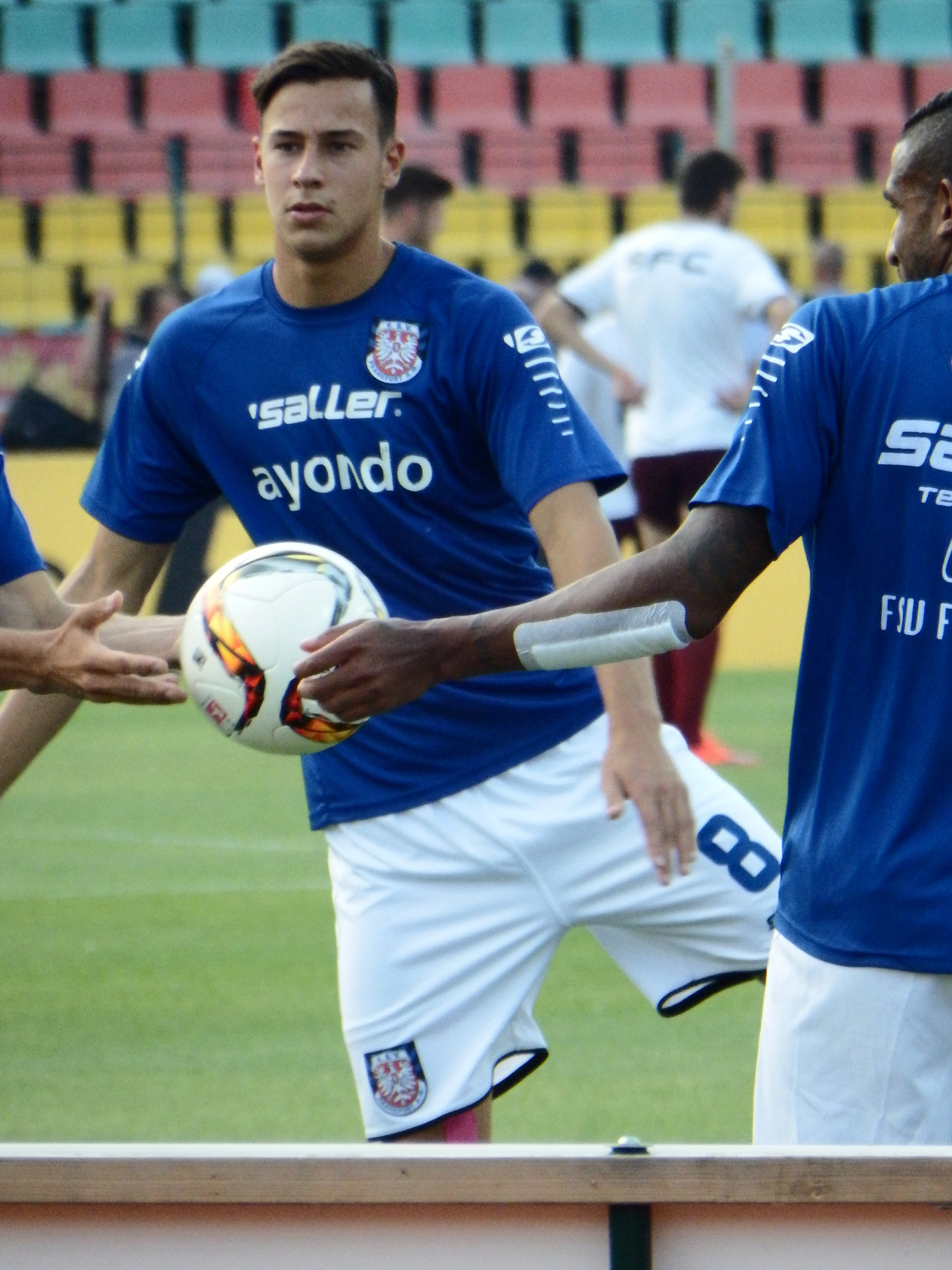 Mario Engels, FSV Frankfurt